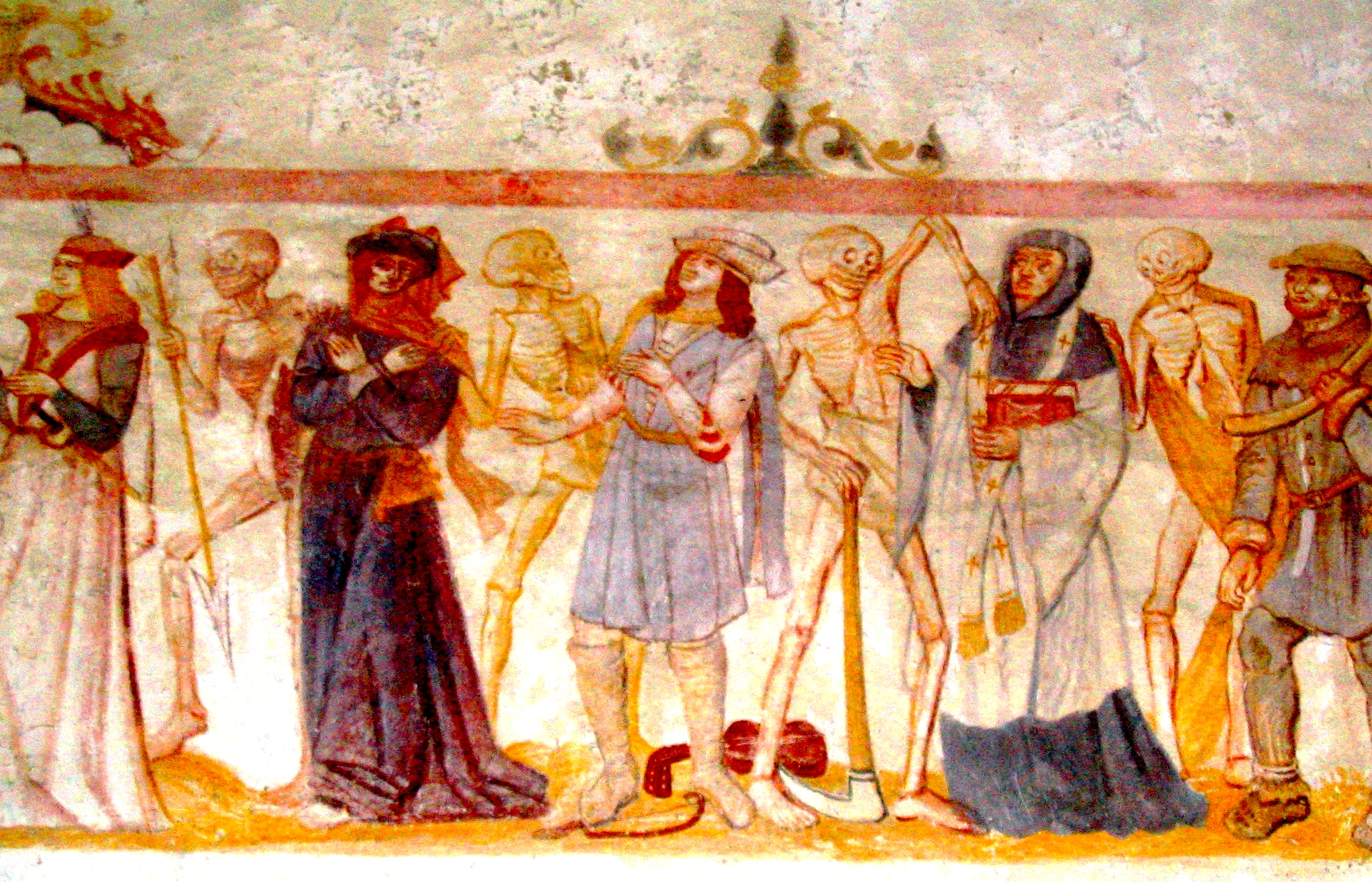 Danse Macabre, fresque de La-Ferté-Loupière, Yonne - France. Wallpaint in the church of La Ferté Loupière, Yonne, France. Auteur/author: P.Charpiat - 2006